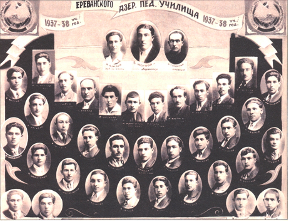 İrəvan Pedaqoji Məktəbinin 1938-ci il buraxılışı